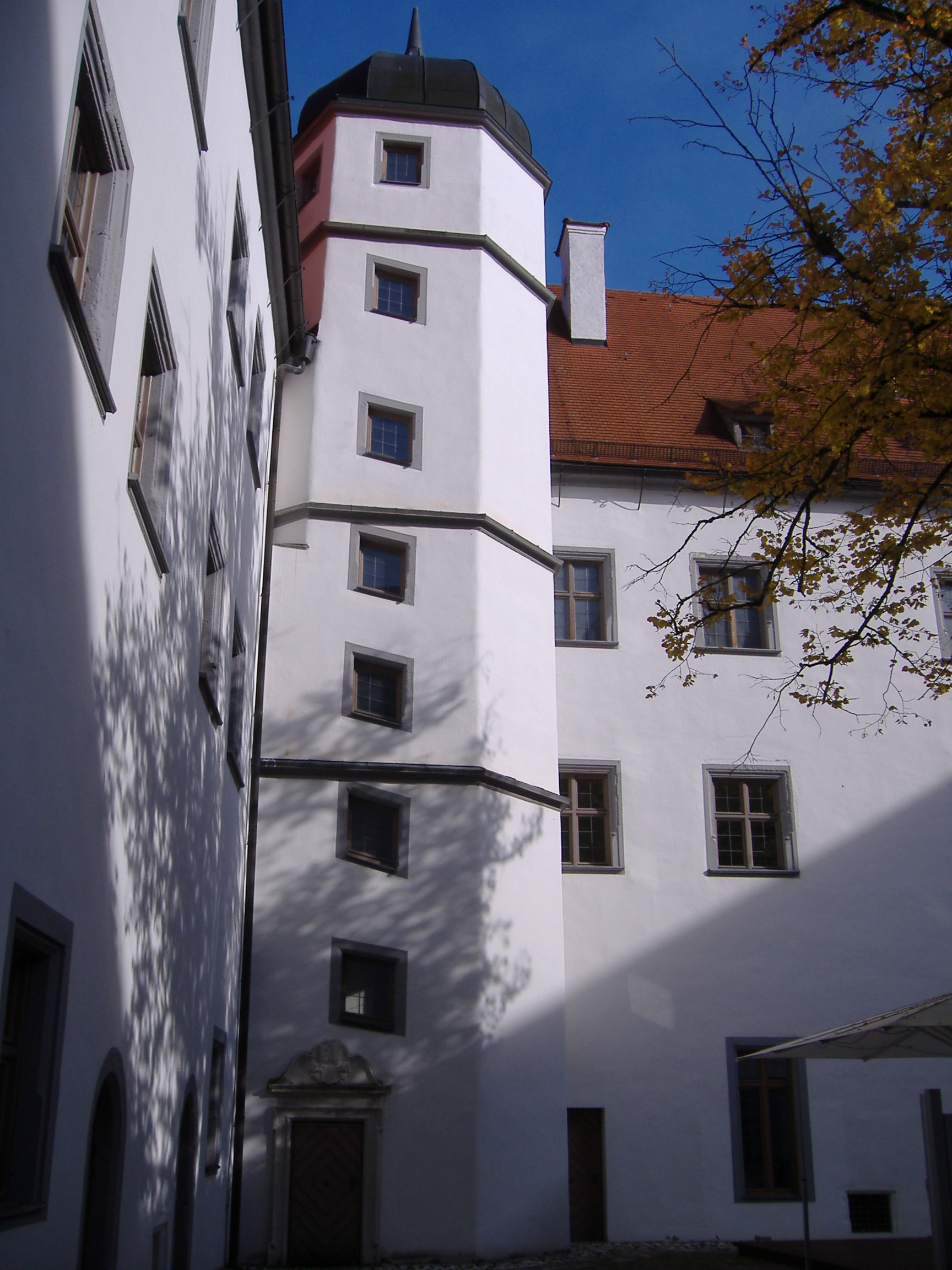 Höchstädt